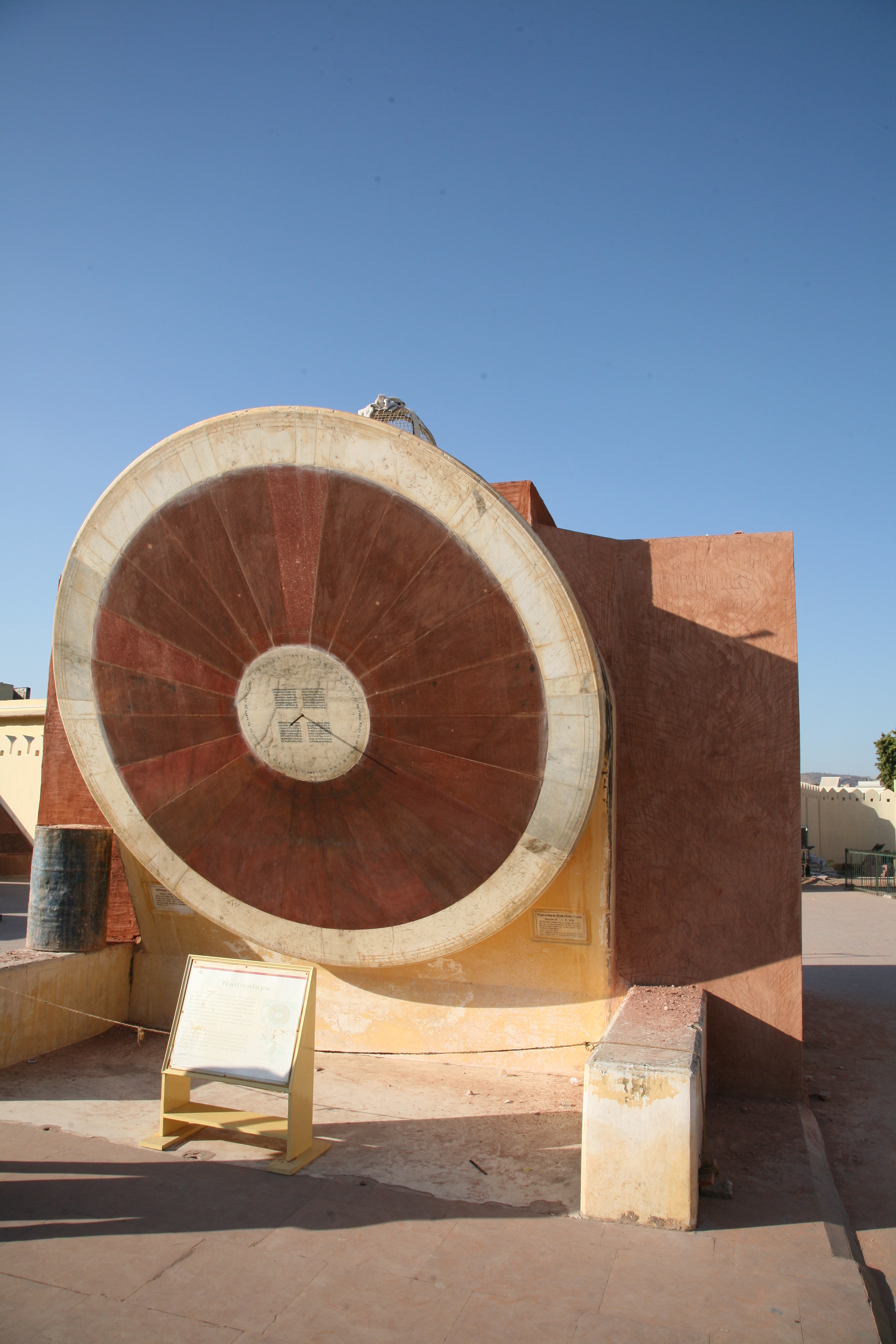 From Jantar Mantar in Jaipur.